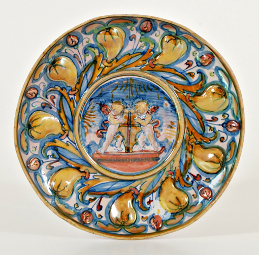 Coppa Sperindio. Bottega di Maestro Giorgio Andreoli. Gubbio, !530-1550 c.